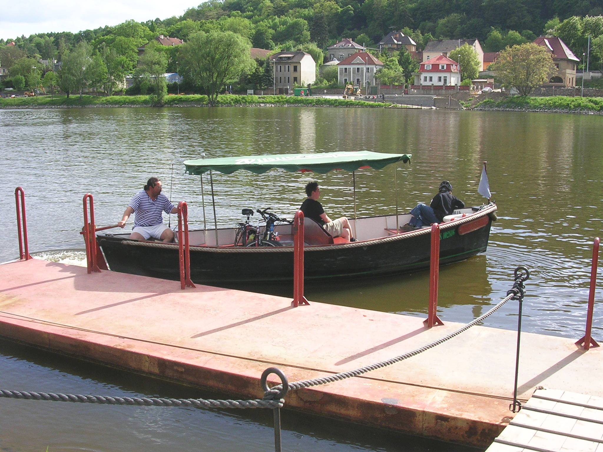 Přívoz Sedlec-Zámky, odjezd ze Zámků, pohled směrem na Sedlec. Člun Čolek, 102 816.